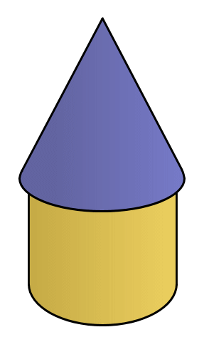 Kegeldach